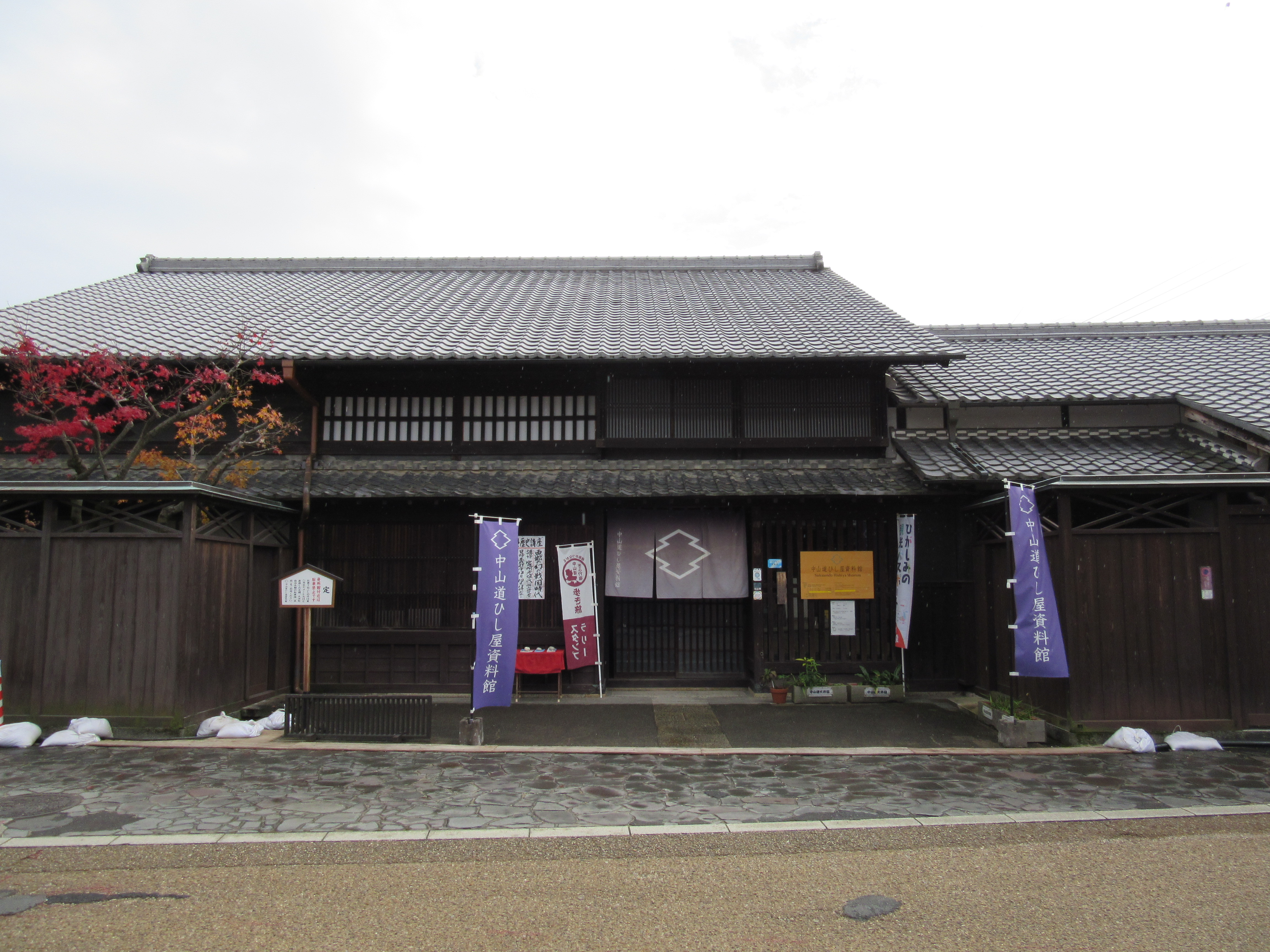 中山道ひし屋資料館